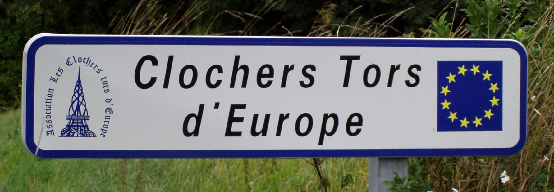 photo personnelle de la pancarte signalant un clocher tors, prise le 3 septembre 2006 par Accrochoc.